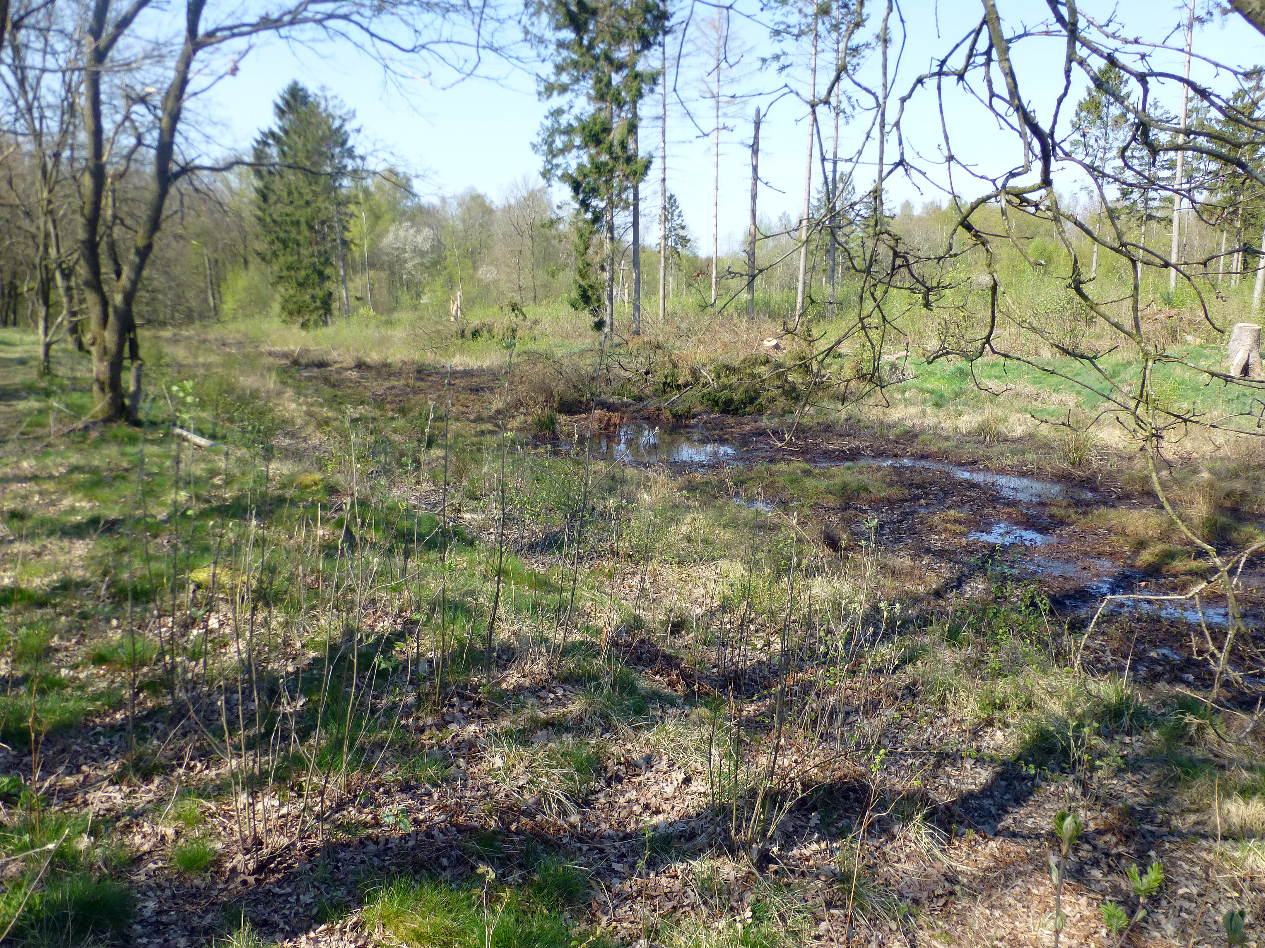 Christian IIIs kanal er en 5.400 m lang og 4-5 m bred kanal, der forbinder den opstemmede Nørreå med voldgravene omkring Randers. Kanalen tager sin begyndelse ved Fladbro vest for Randers